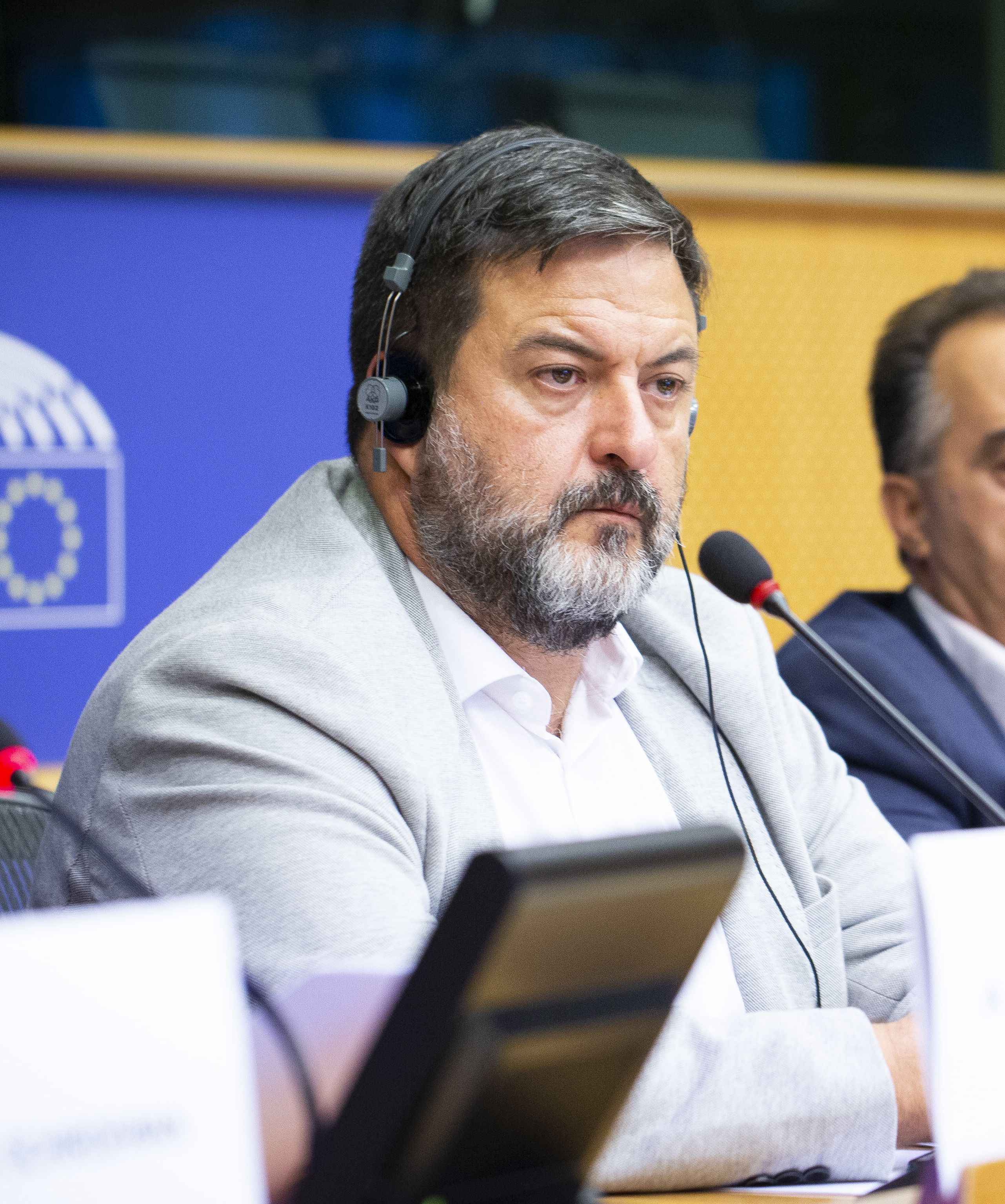 F70A9114